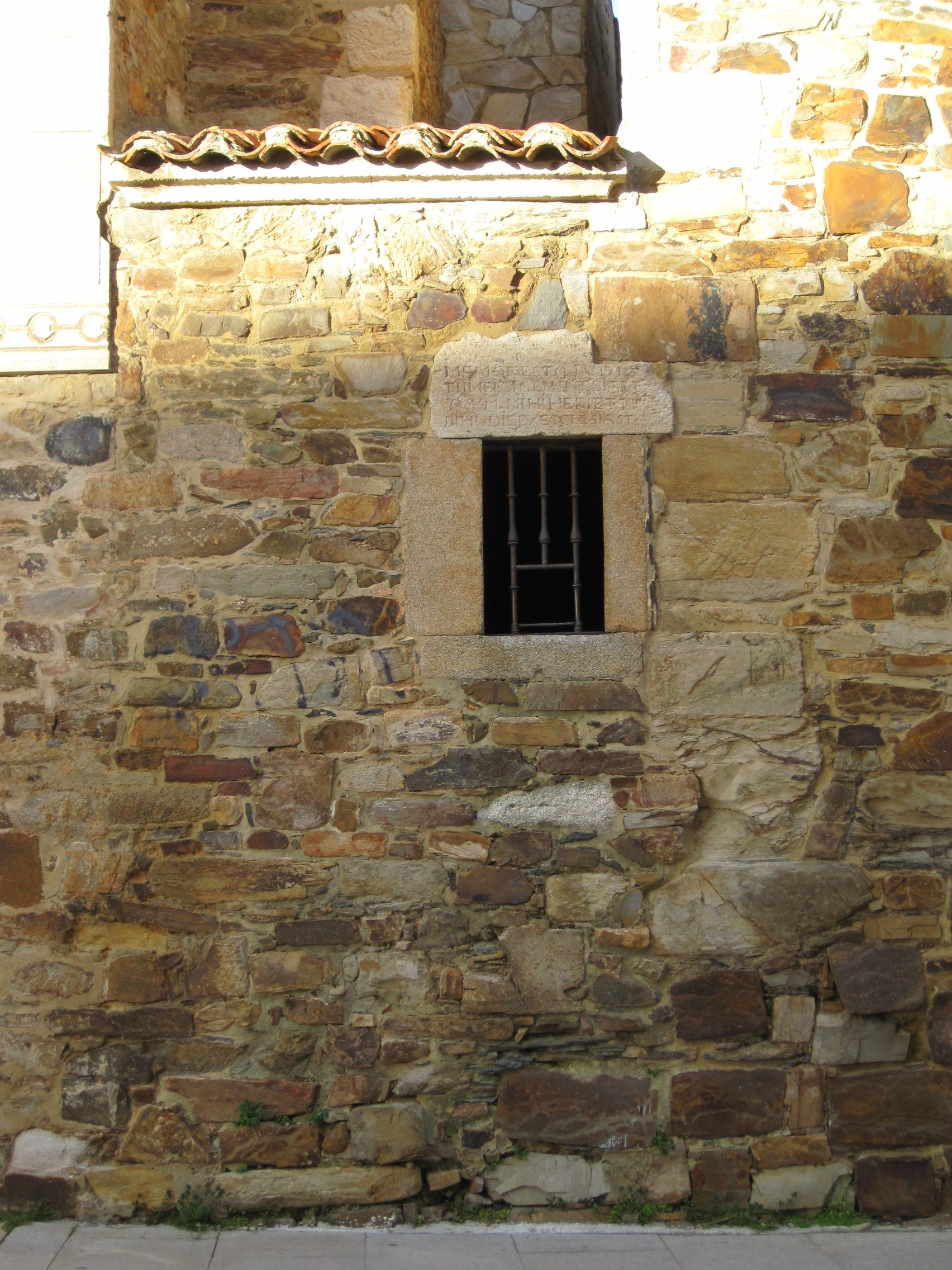 Vista de la celda de las emparedadas, junto a la iglesia de Santa Marta, Astorga (León, España).